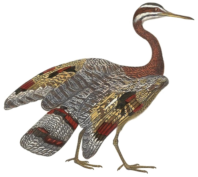 Planche N°72 dessinée par Edouard Traviés provenant du livre "Le règne animal distribué d'après son organisation" par Georges Cuvier (Tome 4), seconde édition de 1828, représentant : Caurale soleil (Eurypyga helias)